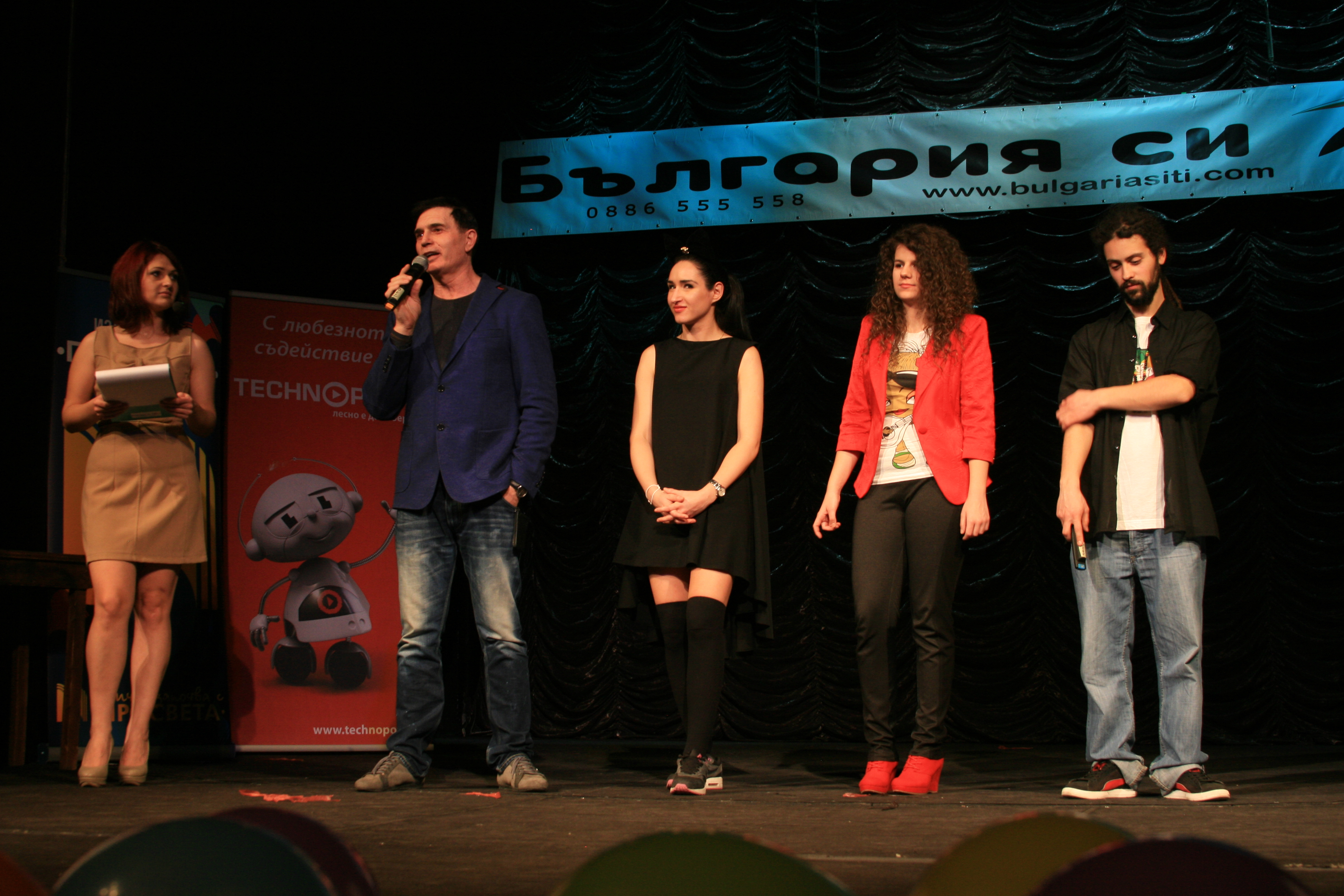 Награждаване на победителите в Цветната олимпиада